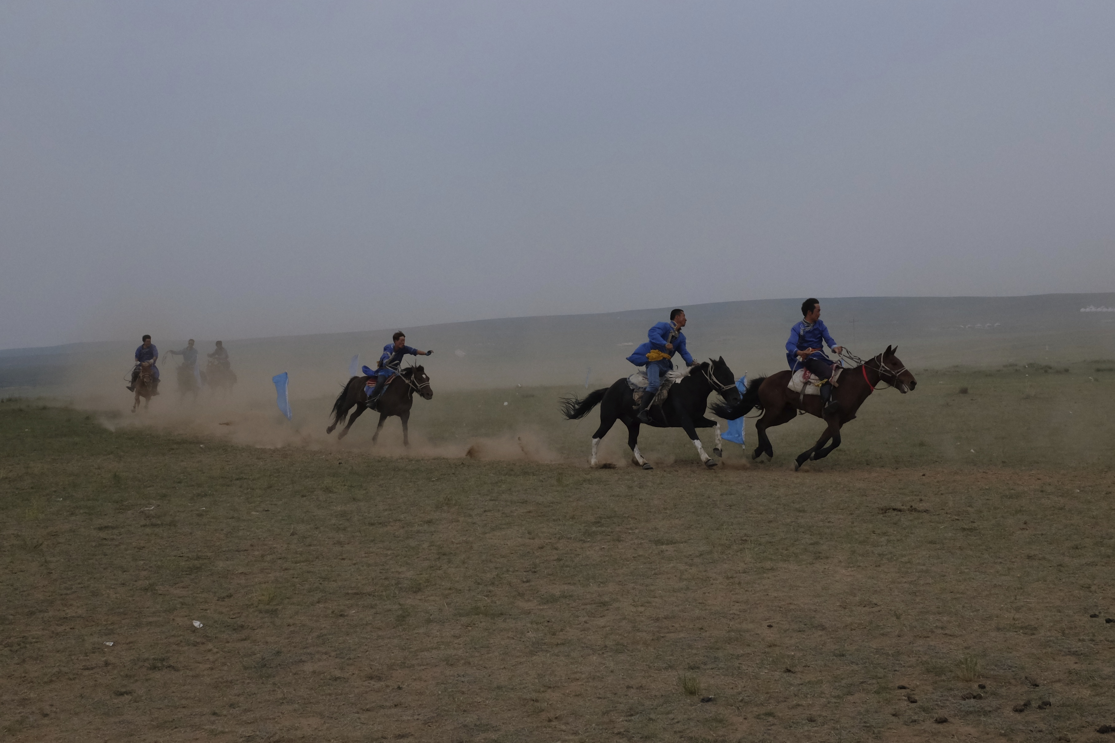 Course de chevaux en Mongolie intérieure